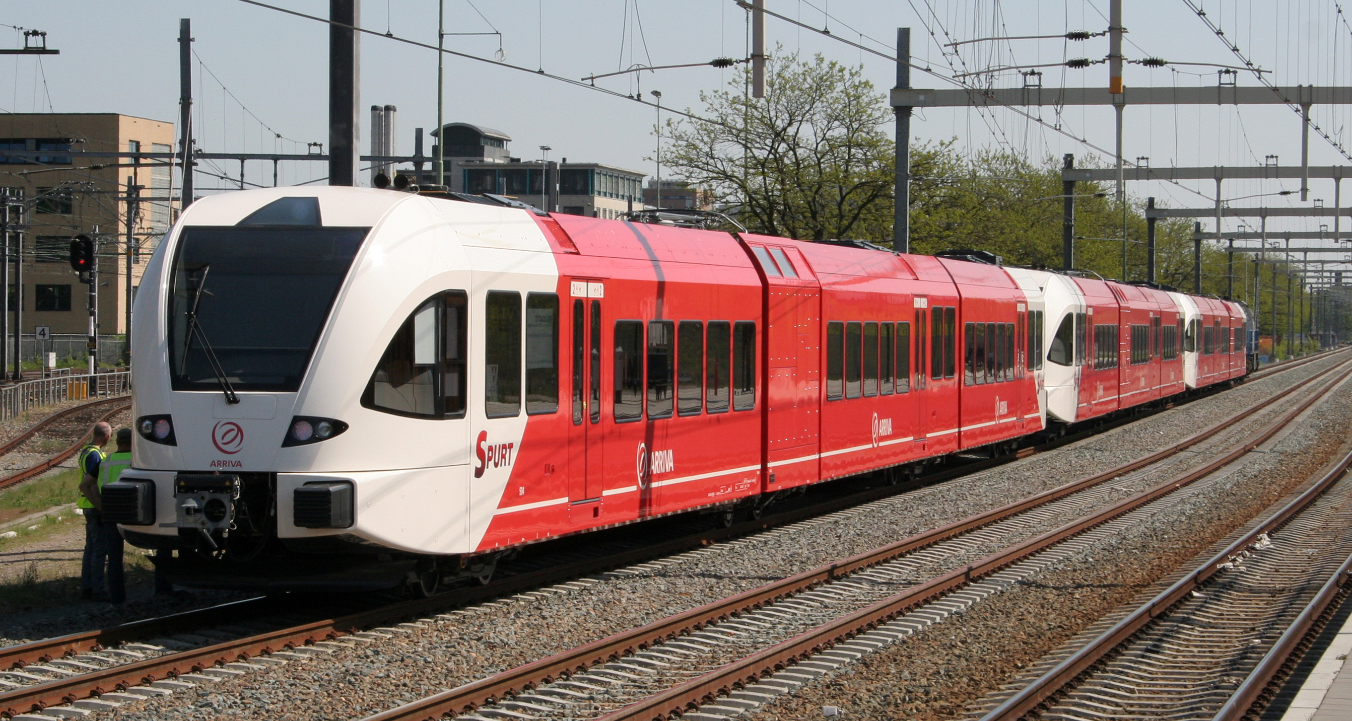 De 502, 503 en 504 bij hun aflevering in Nederland, tijdens een stop in Utrecht.